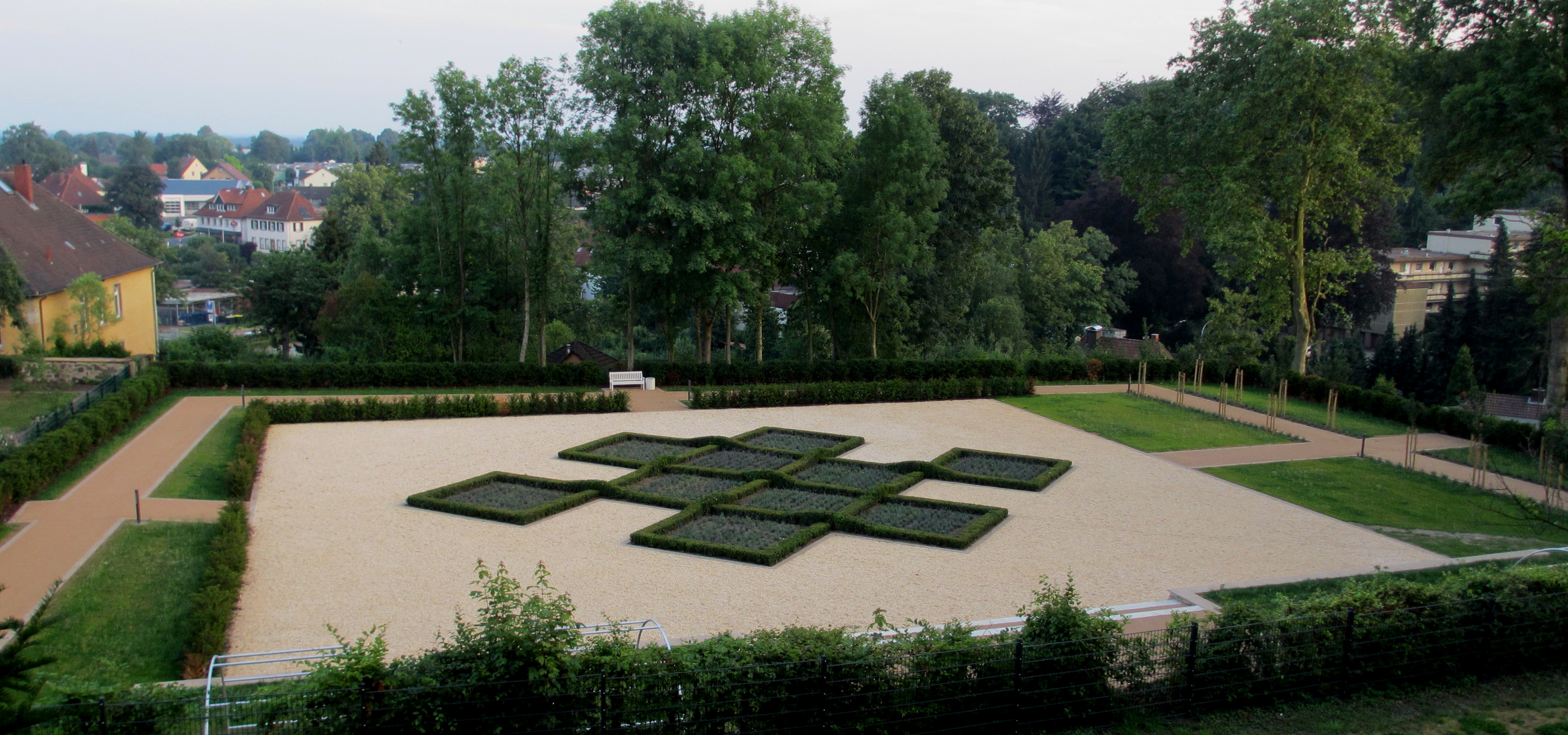 Der Knotengarten von Schloss Iburg (Landkreis Osnabrück, Niedersachsen). Er wurde 2013 auf der Südseite des Schlossbergs angelegt. Für den 3500 Quadratmeter großen Garten wurden Bäume gefällt und Wege zum Schloss und zum Charlottensee neu angelegt.